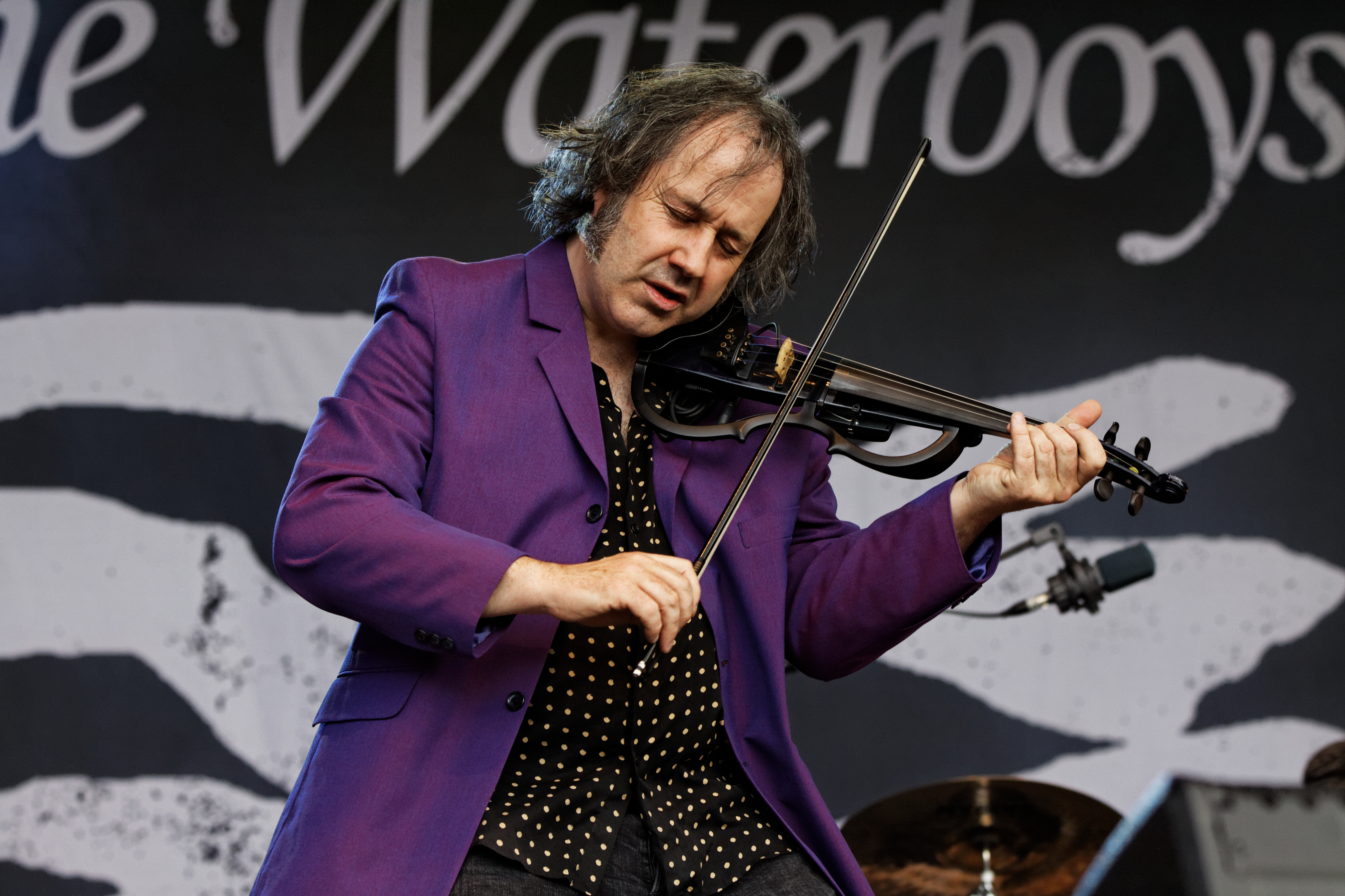 The Waterboys en concert sur la scène Landaoudec lors du festival du bout du Monde à Crozon dans le Finistère (France).